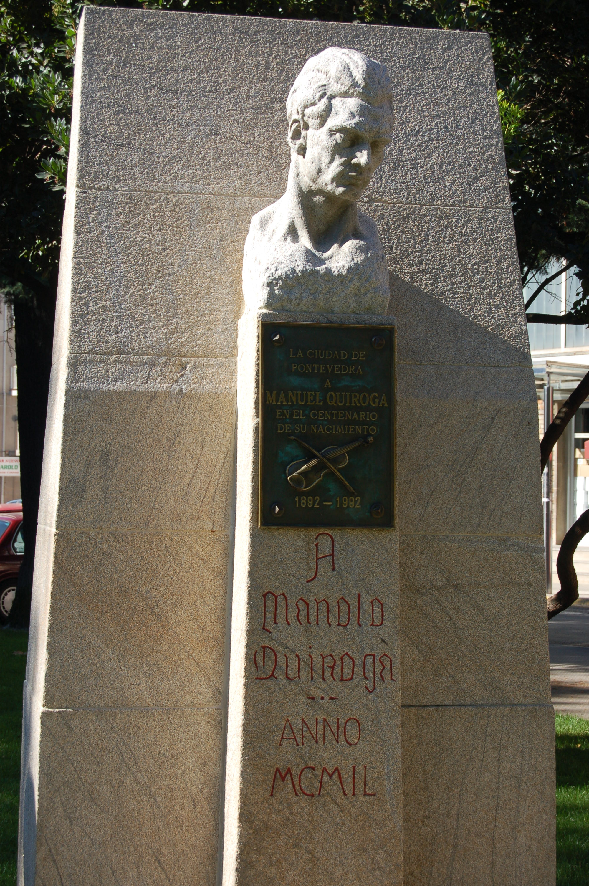 Estatua de Manuel Quiroga en Pontevedra